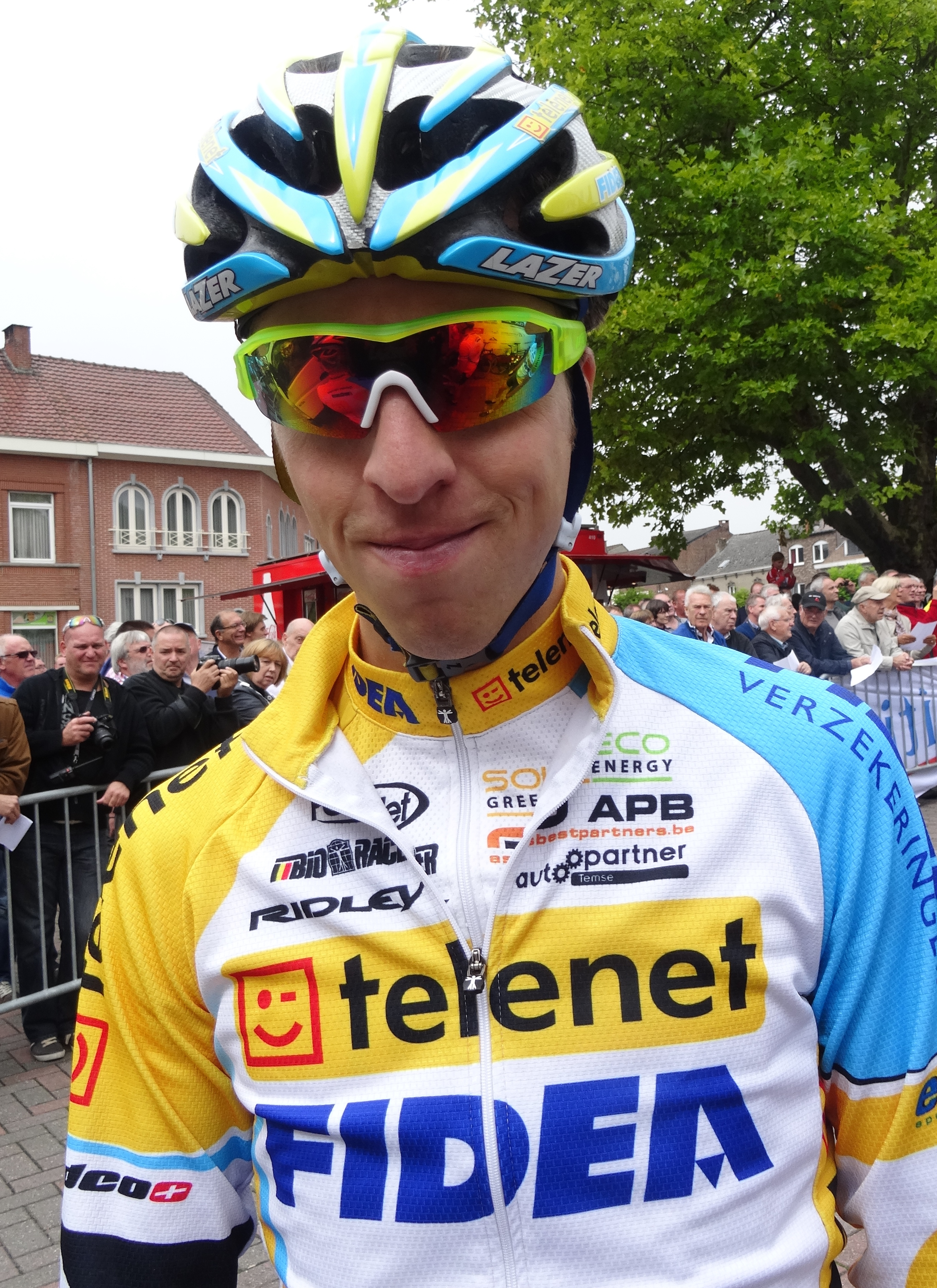 Reportage photographique réalisé le mercredi 27 août à l'occasion du départ de la Druivenkoers Overijse 2014 à Huldenberg, Belgique.